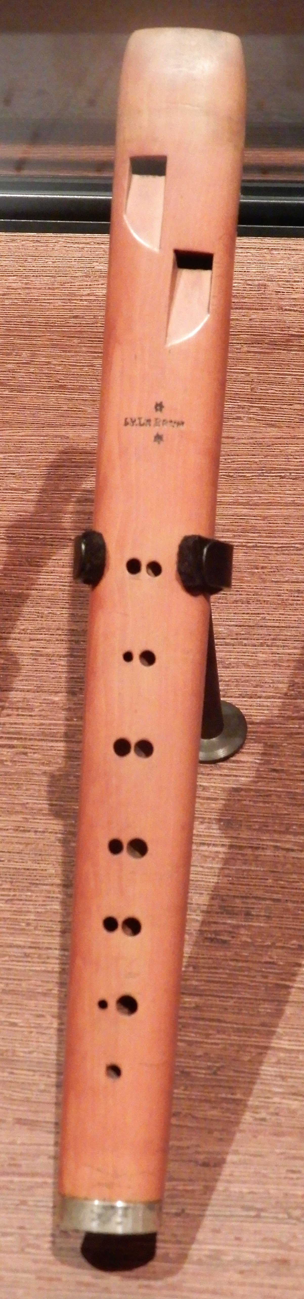 Flageolet double, I. M. Lebrun, Bruxelles, 1800-1850, Musée des Instruments de musique de Bruxelles, inv. 2638